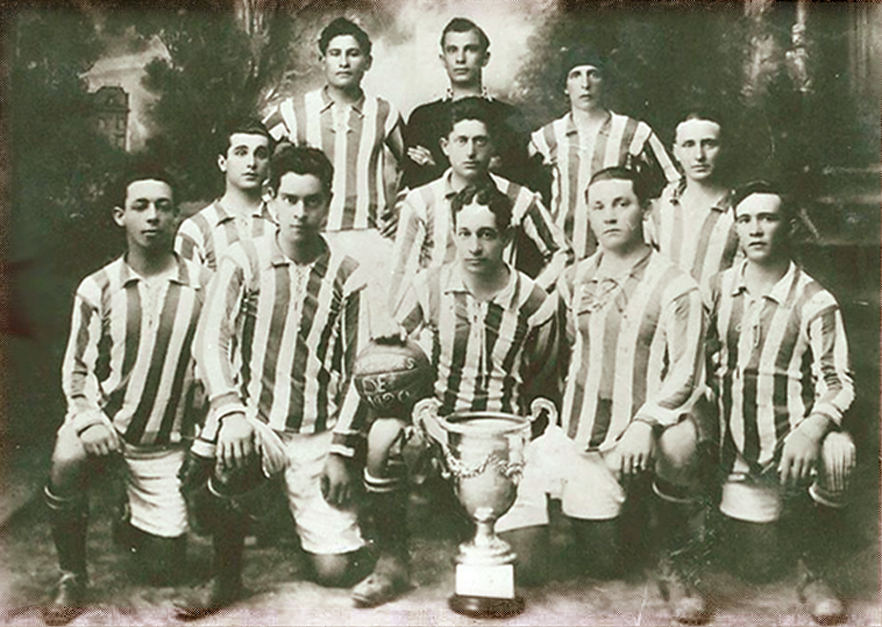 Time do EC Juventude. Atrás: Celestino Bortogaray, Nicolau e Bado; no meio: Gabriel Sartori, Vicente Luizi e Henrique Mengatto; na frente: Edemor Ferreira, Pepito, Martinez, Herminio Zanella e Rio Grande. Este time foi campeão estadual vencendo o Grêmio de Porto Alegre por 2x0 mas teve a vitória anulada por recurso judicial devido à inscrição do nome de um jogador com erro de grafia.